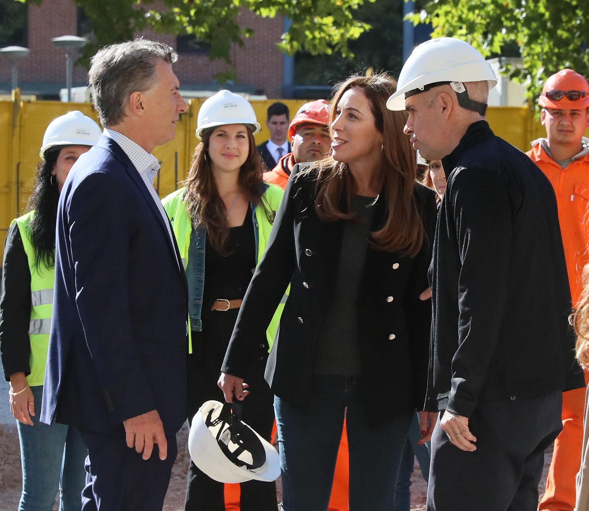 El presidente Mauricio Macri recorrió el Paseo del Bajo, una obra vial que conectará el sur con el norte del conurbano bonaerense y creará nuevos espacios verdes en la Ciudad de Buenos Aires.